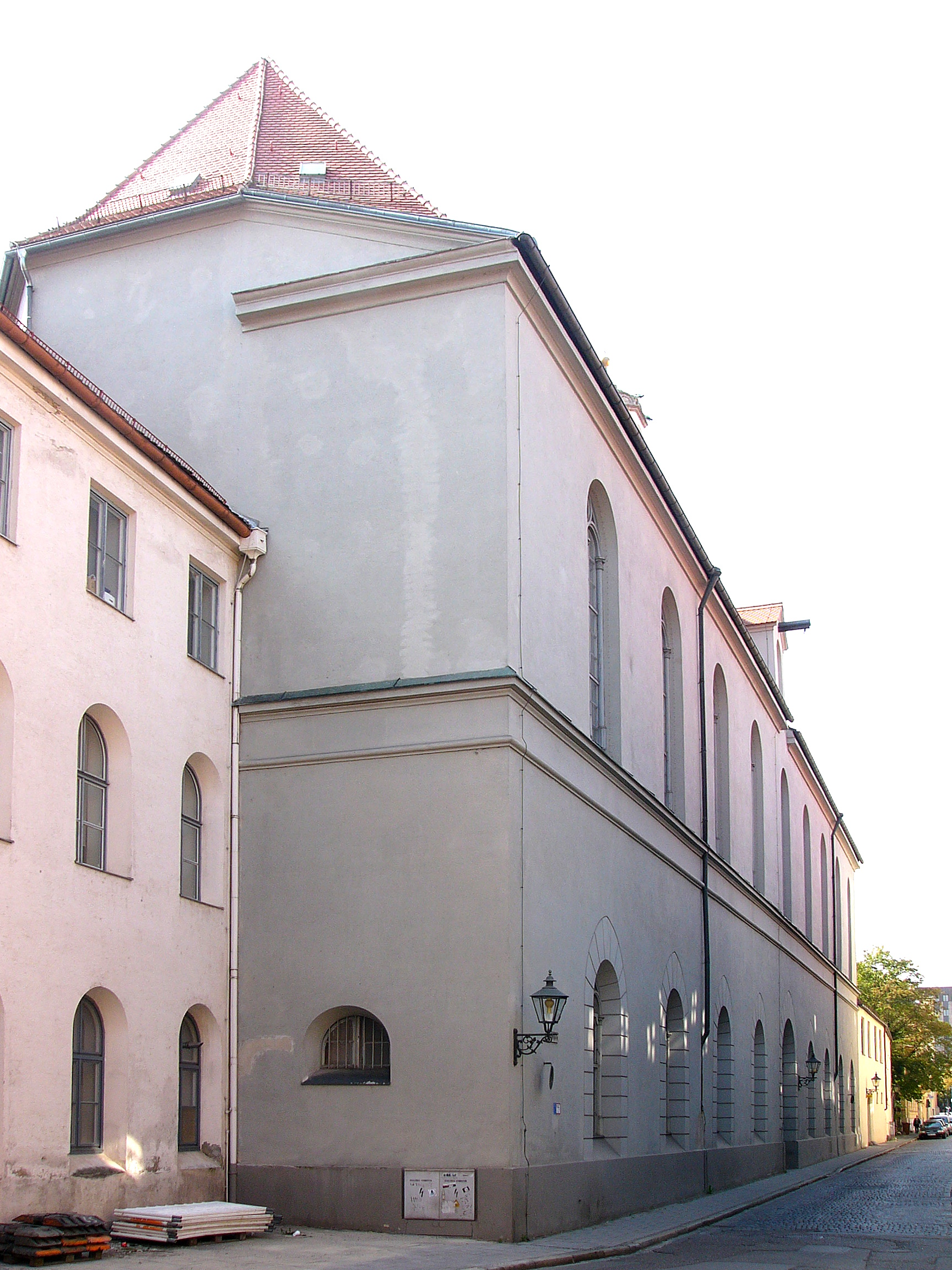 Ehem. Dominikanerinnenkloster St. Katharina, jetzt Staatsgalerie Altdeutsche Meister; bestehend aus dreigeschossigem Verbindungsbau und ehem. Klosterkirche, zweischiffige Hallenkirche mit Dachreiter und westlichem Wellengiebel, 1251 aus dem Gries hierher verlegt, das Kloster 1498–1503 von Burkhard Engelberg und Ulrich Glurer umgebaut, die Kirche 1516/17 von Hans Engelberg erbaut, Umbau im 18. Jahrhundert und gegen 1835 bei Einrichtung der Gemäldegalerie; Ost-, Süd- und Westtrakt des Klosters siehe Hallstraße 10.This is a photograph of an architectural monument.